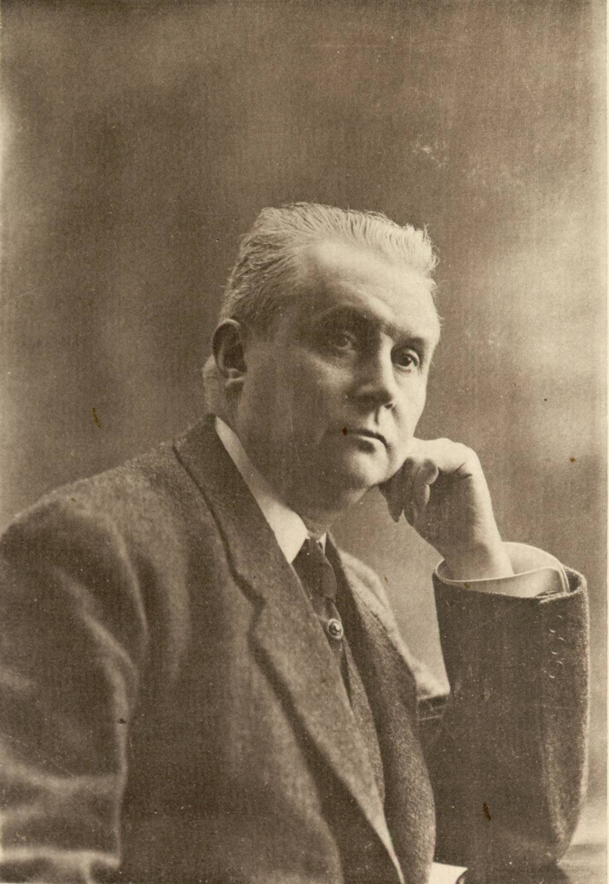 Fotografia de Rossend Serra i Pagès